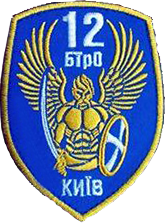 Шеврони 12 б ТрО.